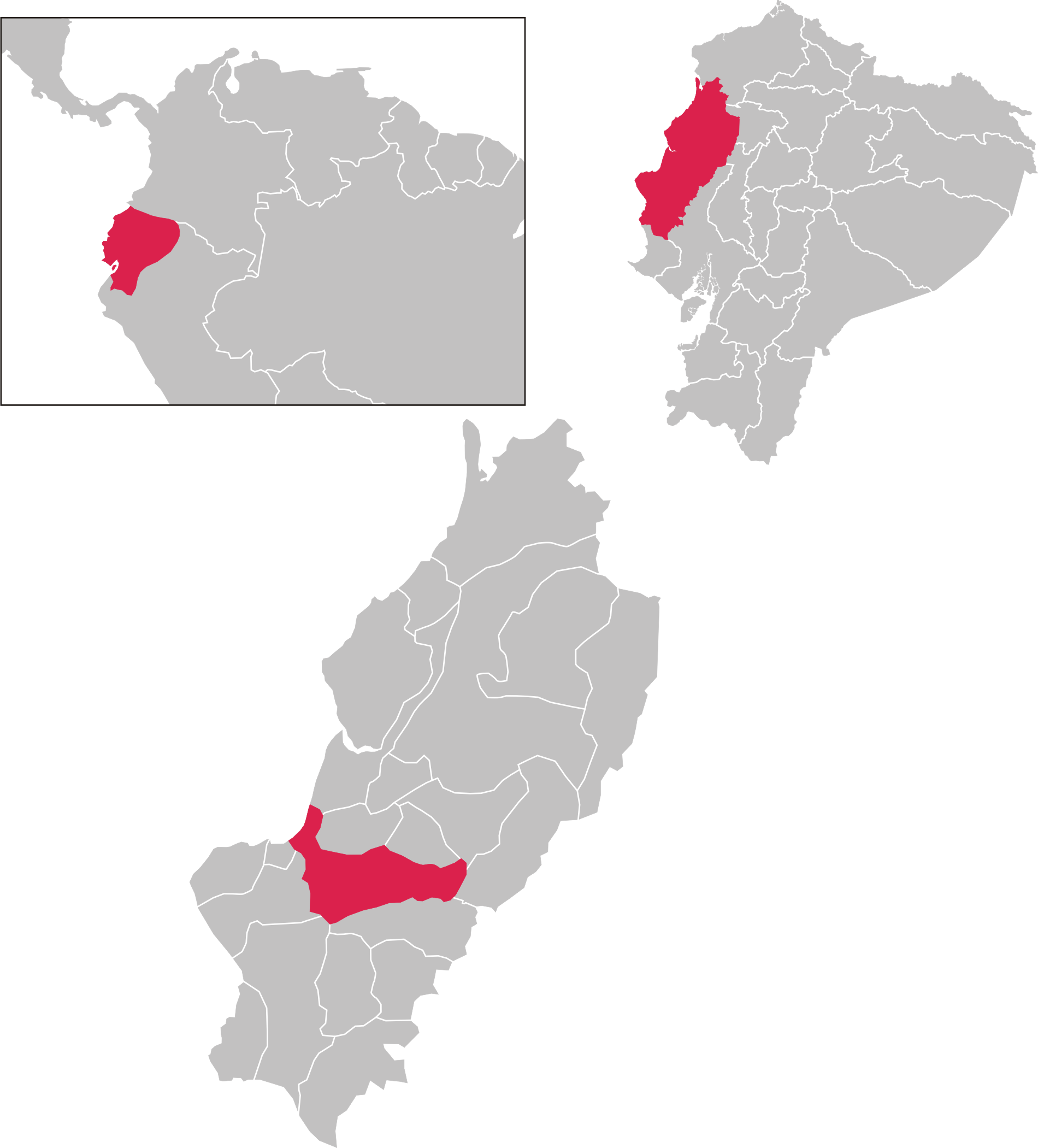 Ubicación de Portoviejo en la provincia de Manabi, Ecuador